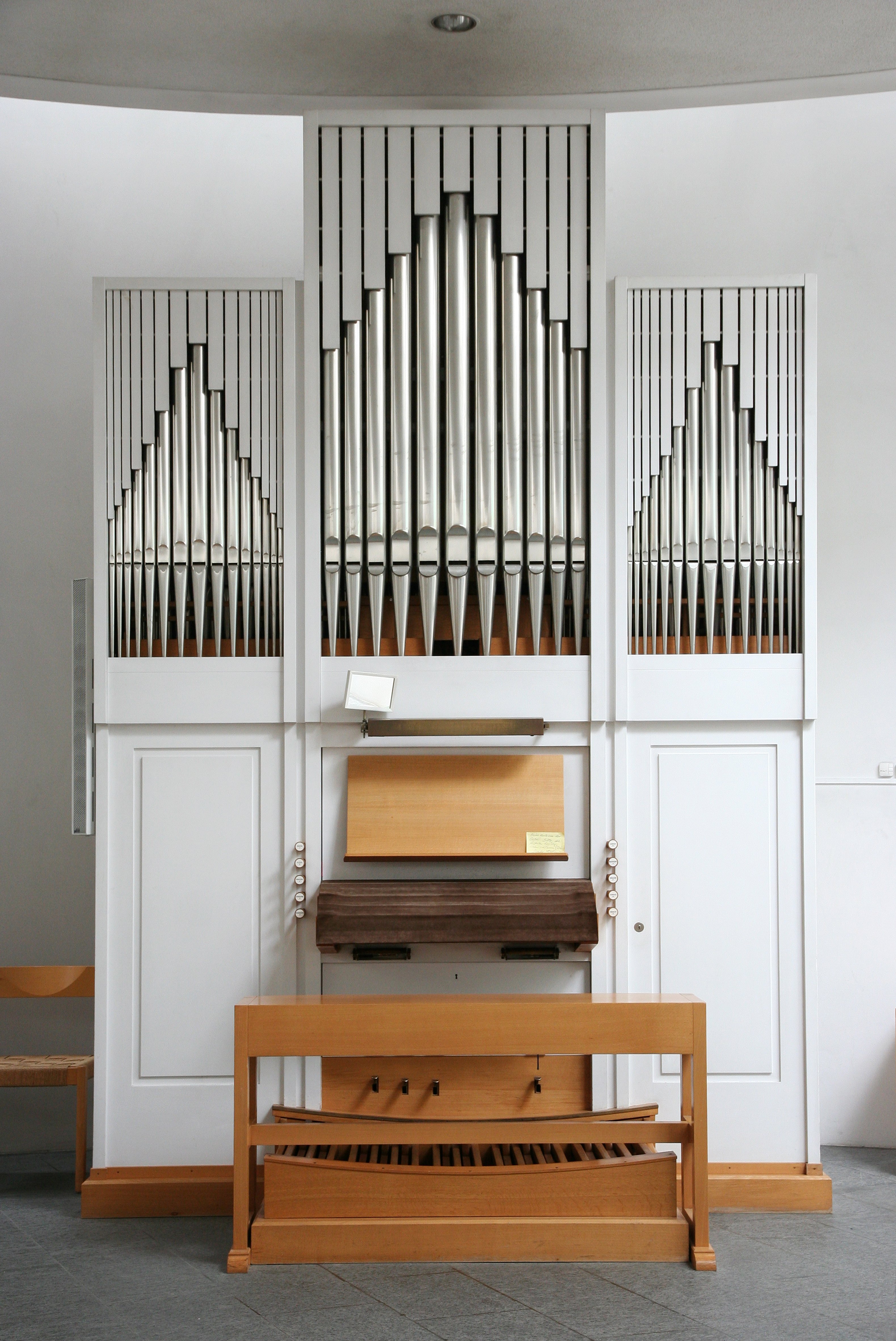 Römisch-katholische Kirche Heilig Chrüz Oberrieden ZH, Orgel